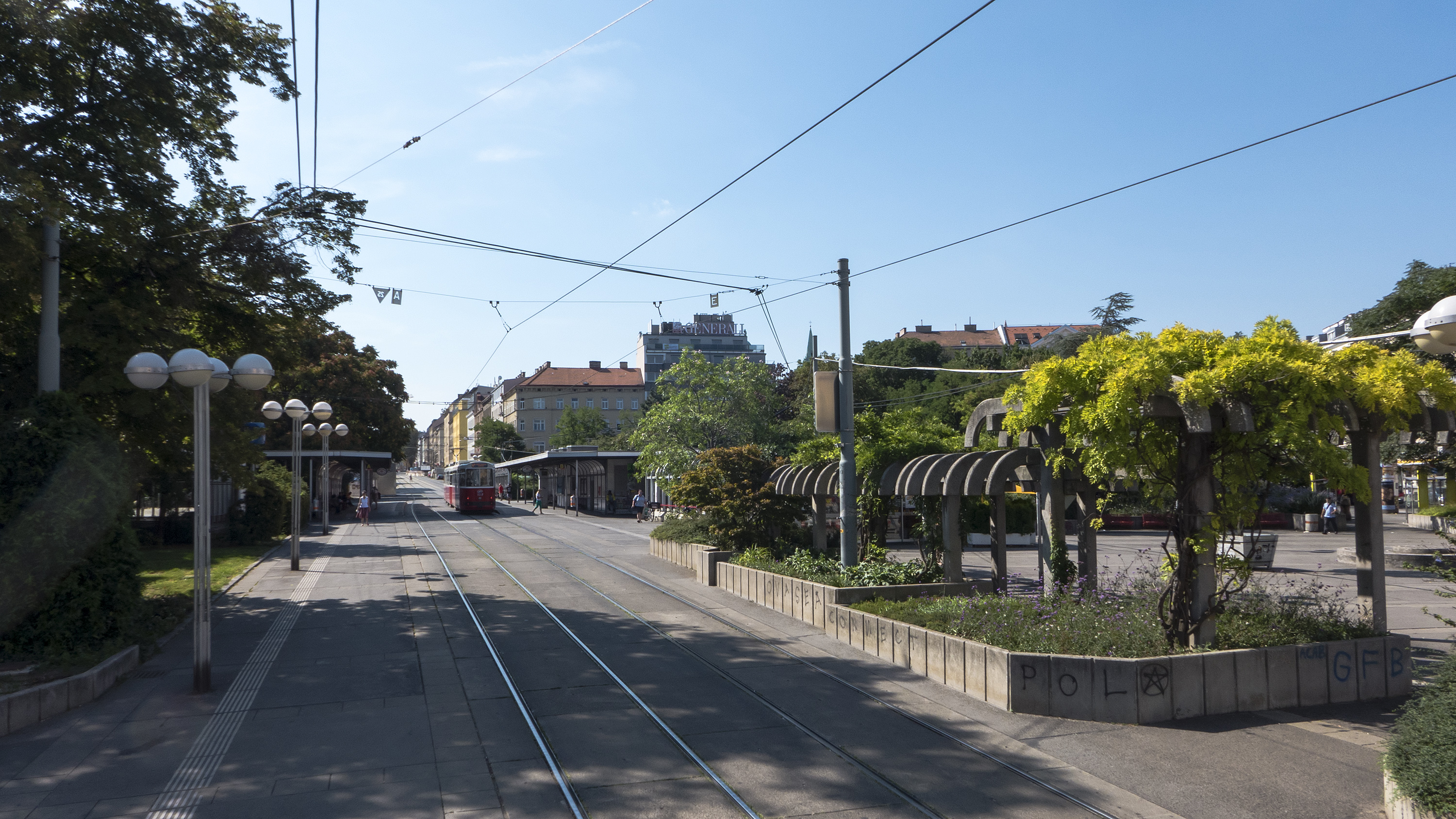 Reumannplatz in Wien 10 Richtung Süden